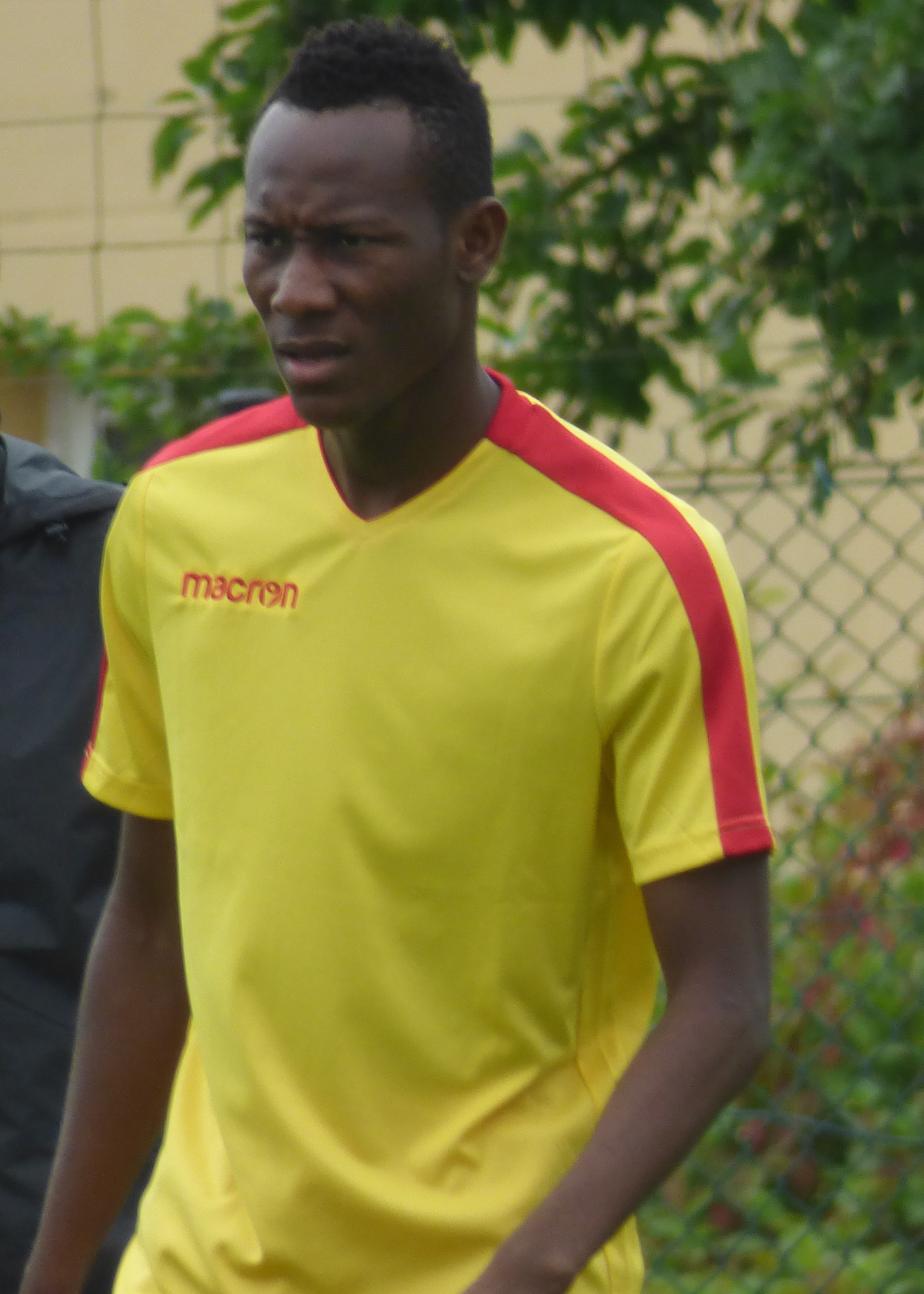 Cyrille Bayala lors d'un entraînement public du Racing Club de Lens, le 19 juin 2018, au centre technique et sportif de La Gaillette à Avion.